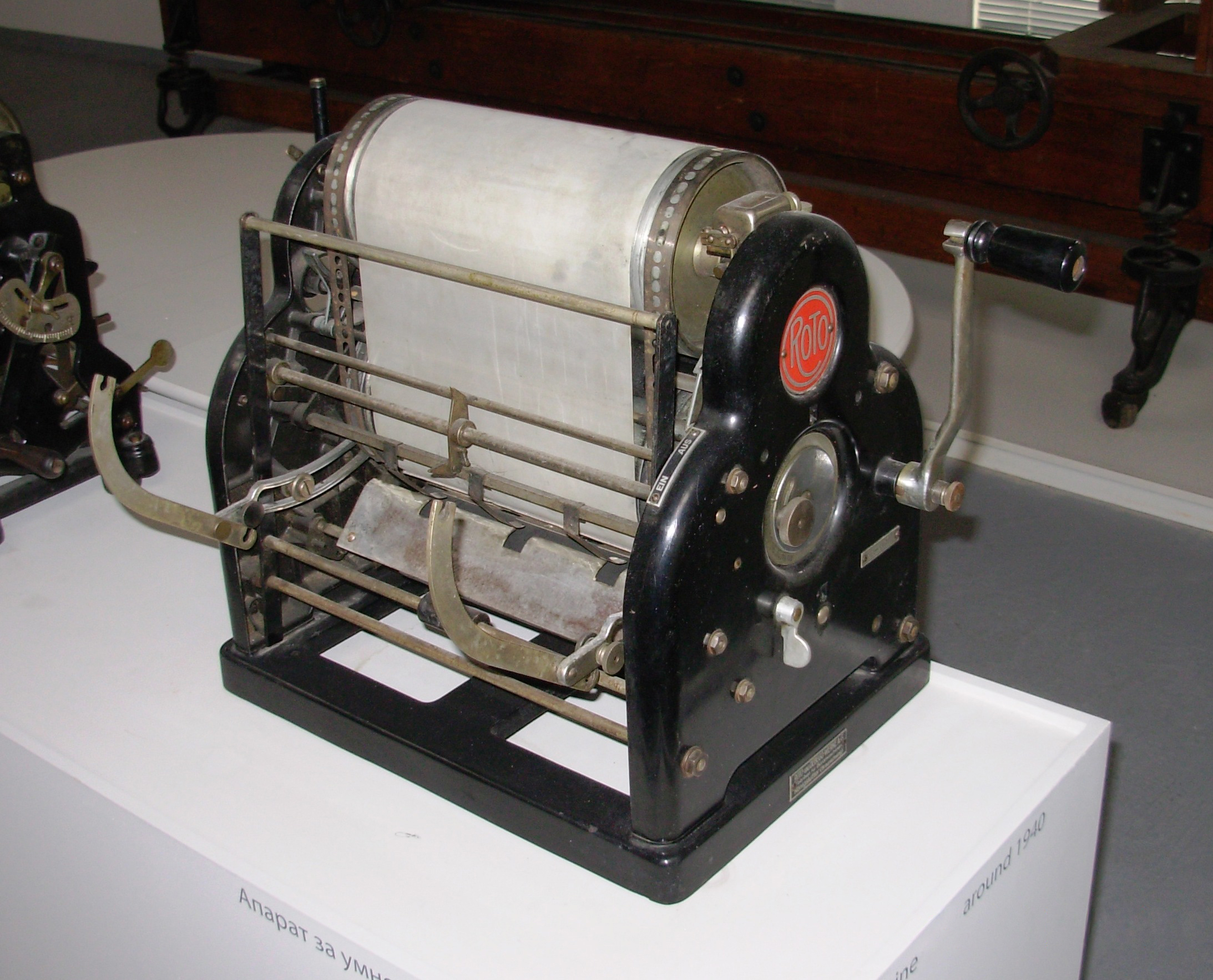 Geštetner u muzeju nauke i tehnike, Beograd. Snimio Goldfinger